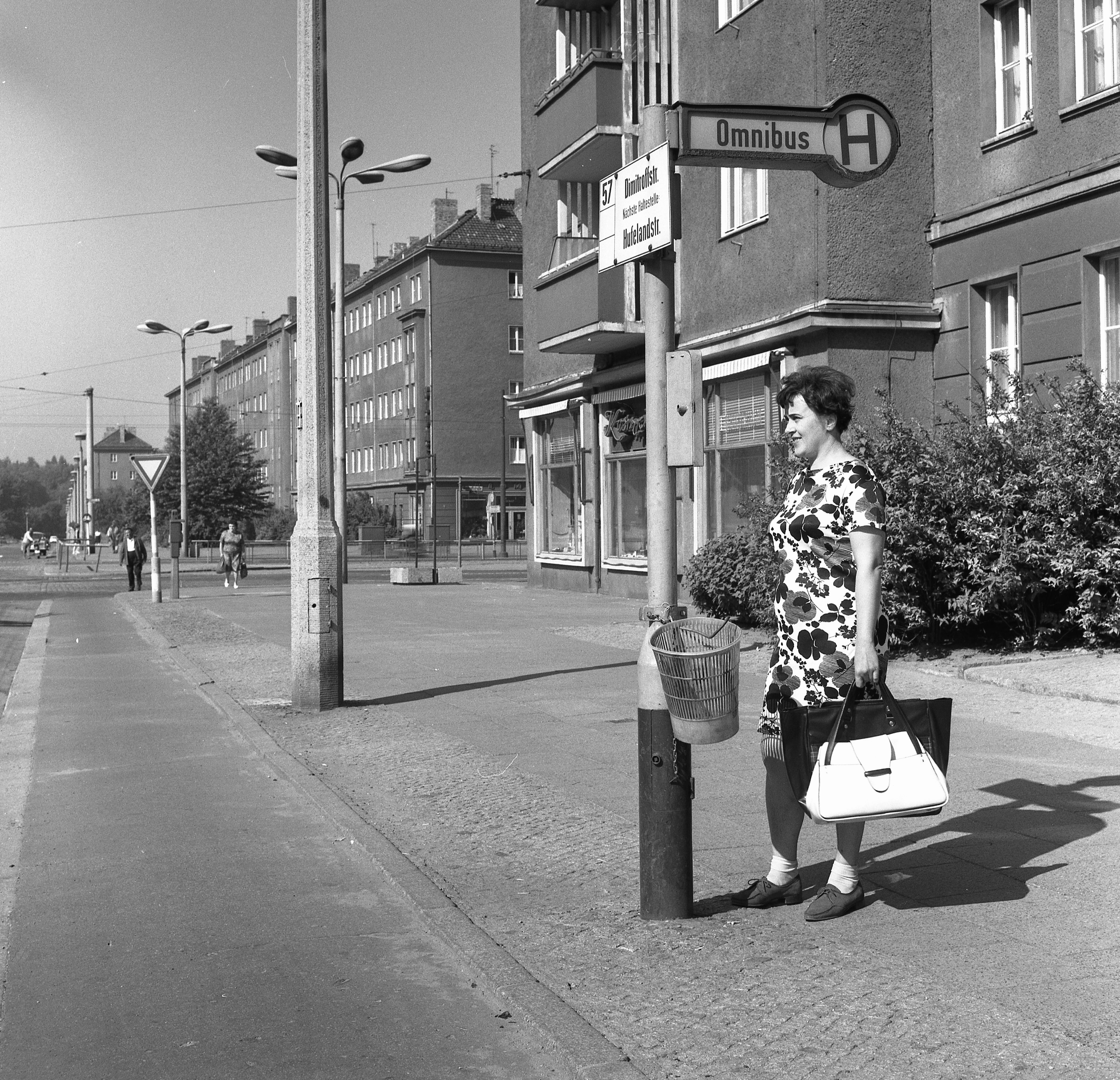 Kelet-Berlin, Kniprodestrasse, keresztben a Danziger Strasse (ekkor Dimitroffstrasse), a Hufelandstrasse felé nézve. Location: Germany, Berlin Tags: GDR, East-Berlin, bus stop Title: Kelet-Berlin, Kniprodestrasse, keresztben a Danziger Strasse (ekkor Dimitroffstrasse), a Hufelandstrasse felé nézve.